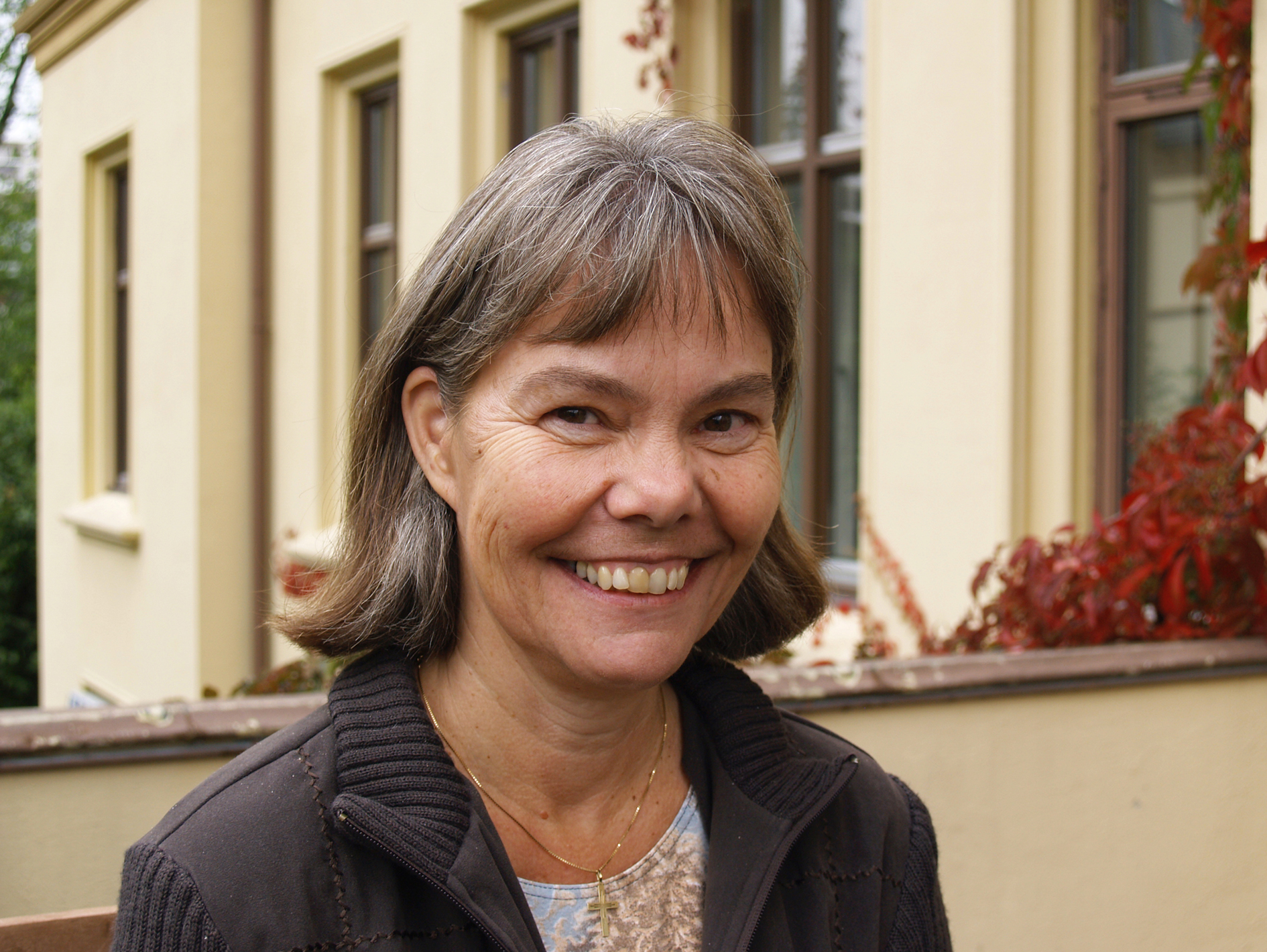 Biskop i Tunsberg, Laila Riksaasen Dahl